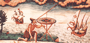 Cosmolabe